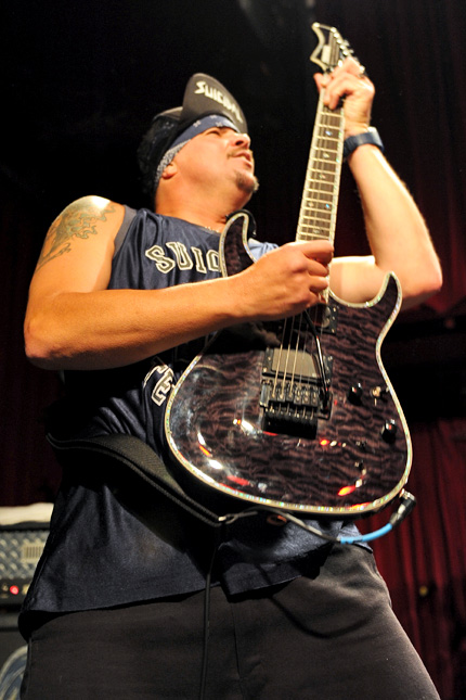 Suicidal Tendencies @ Capitol (18/5/2011)